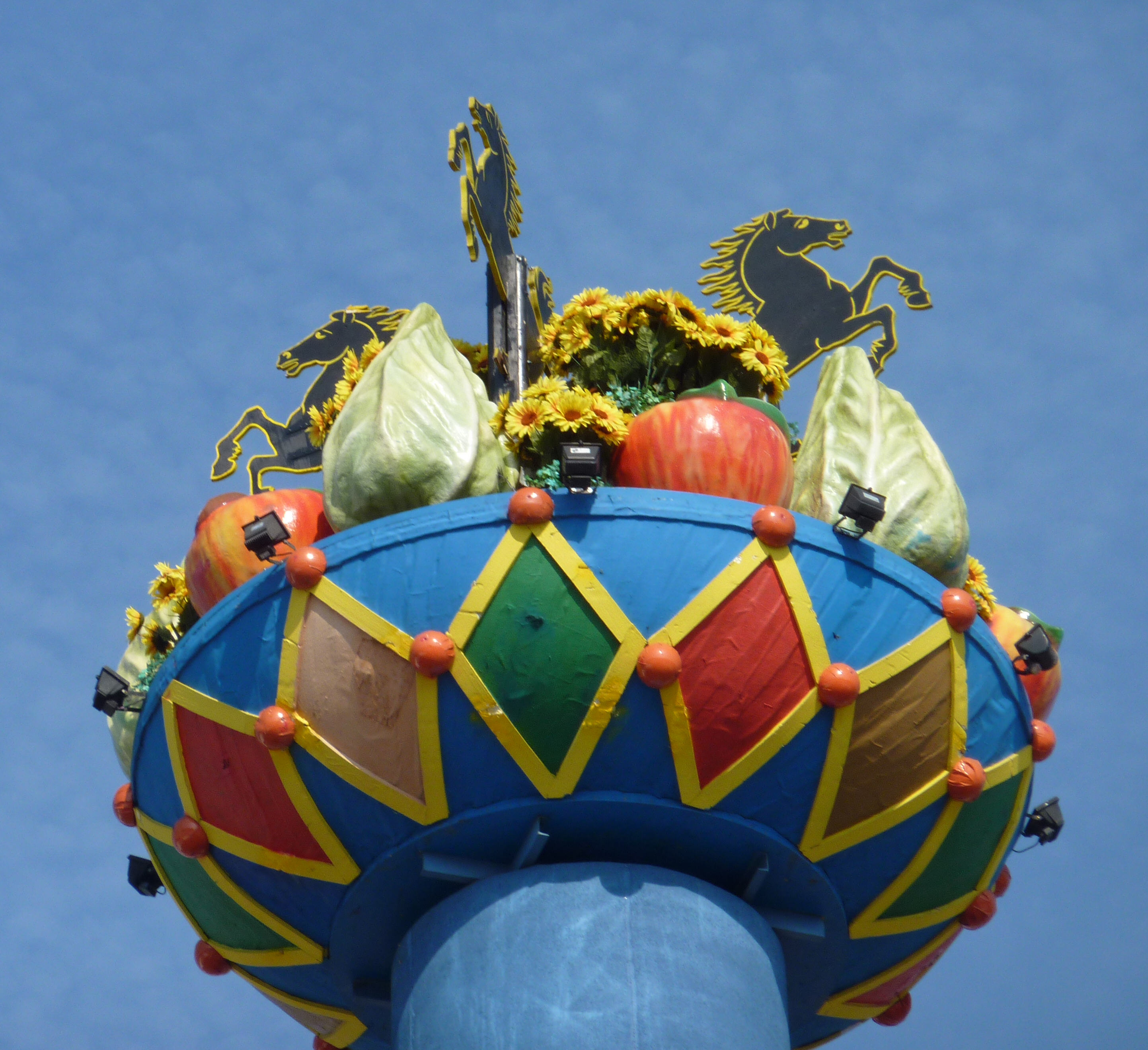 Cannstatter Volksfest 2011, Fruchtsäule, Detail